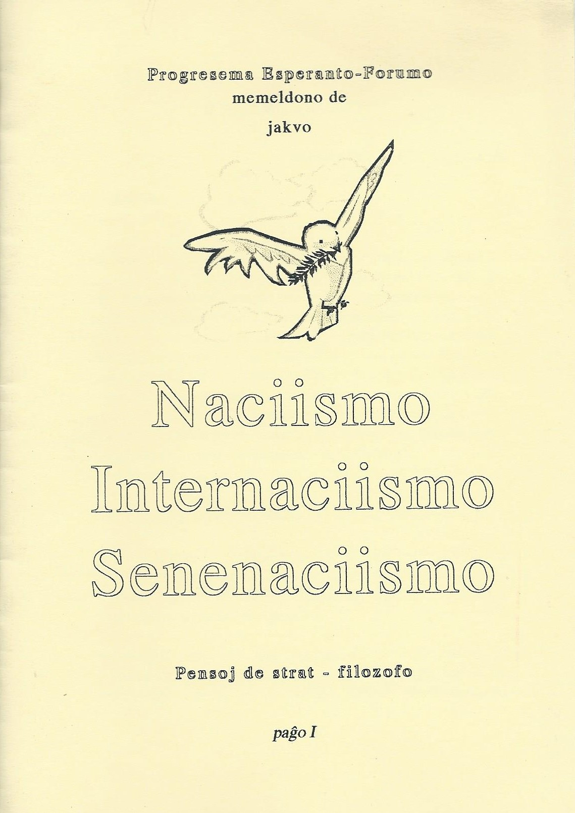 kovrilo de "Naciismo Internaciismo Sennaciismo", 2000